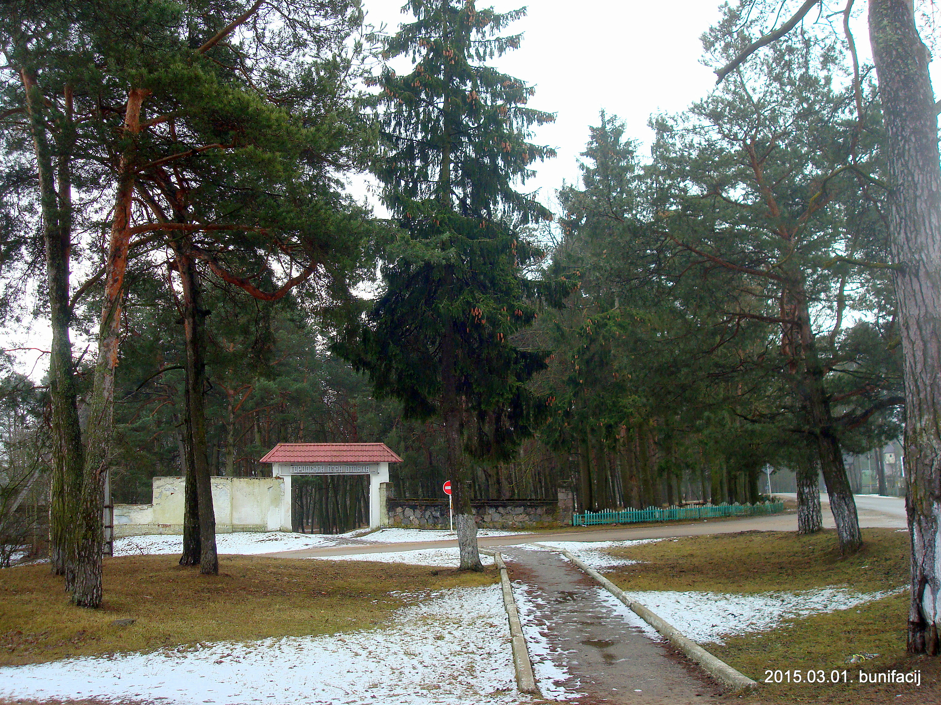 Парк в Воропаево